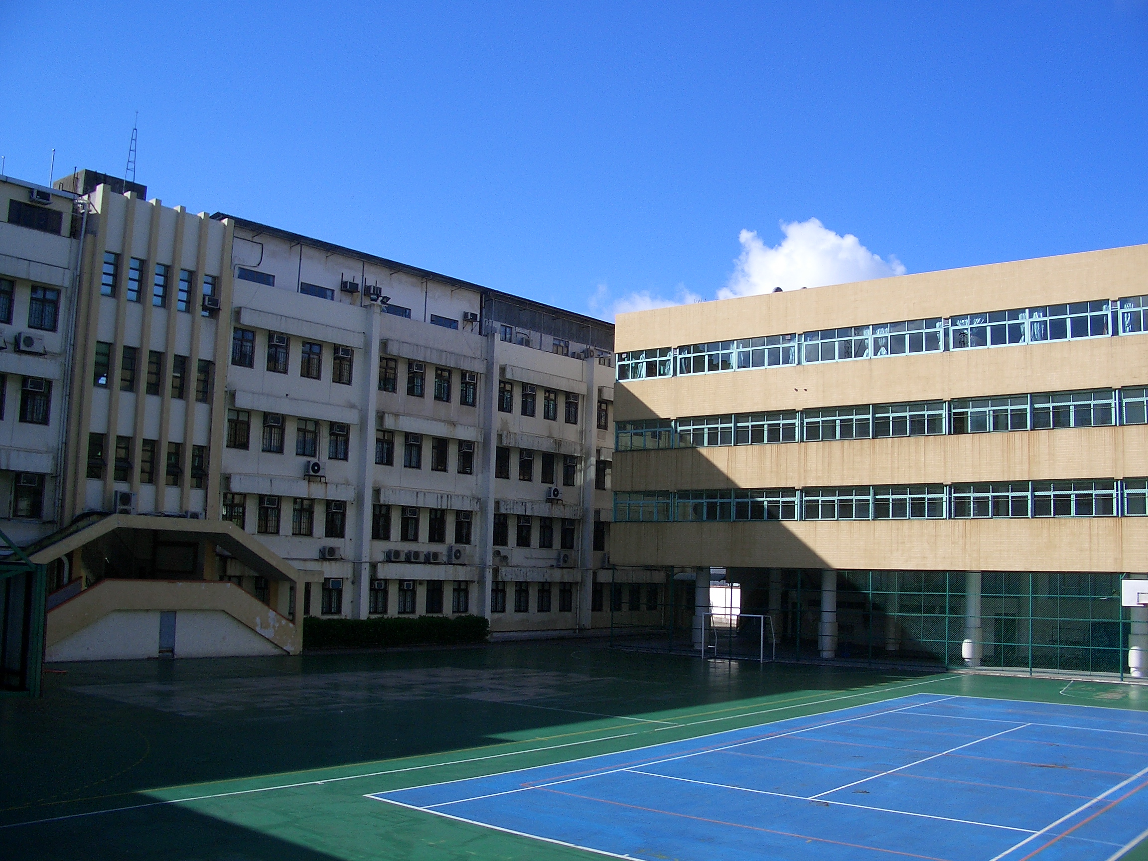 聖若瑟教區中學校本部操場，來源：自己拍攝。